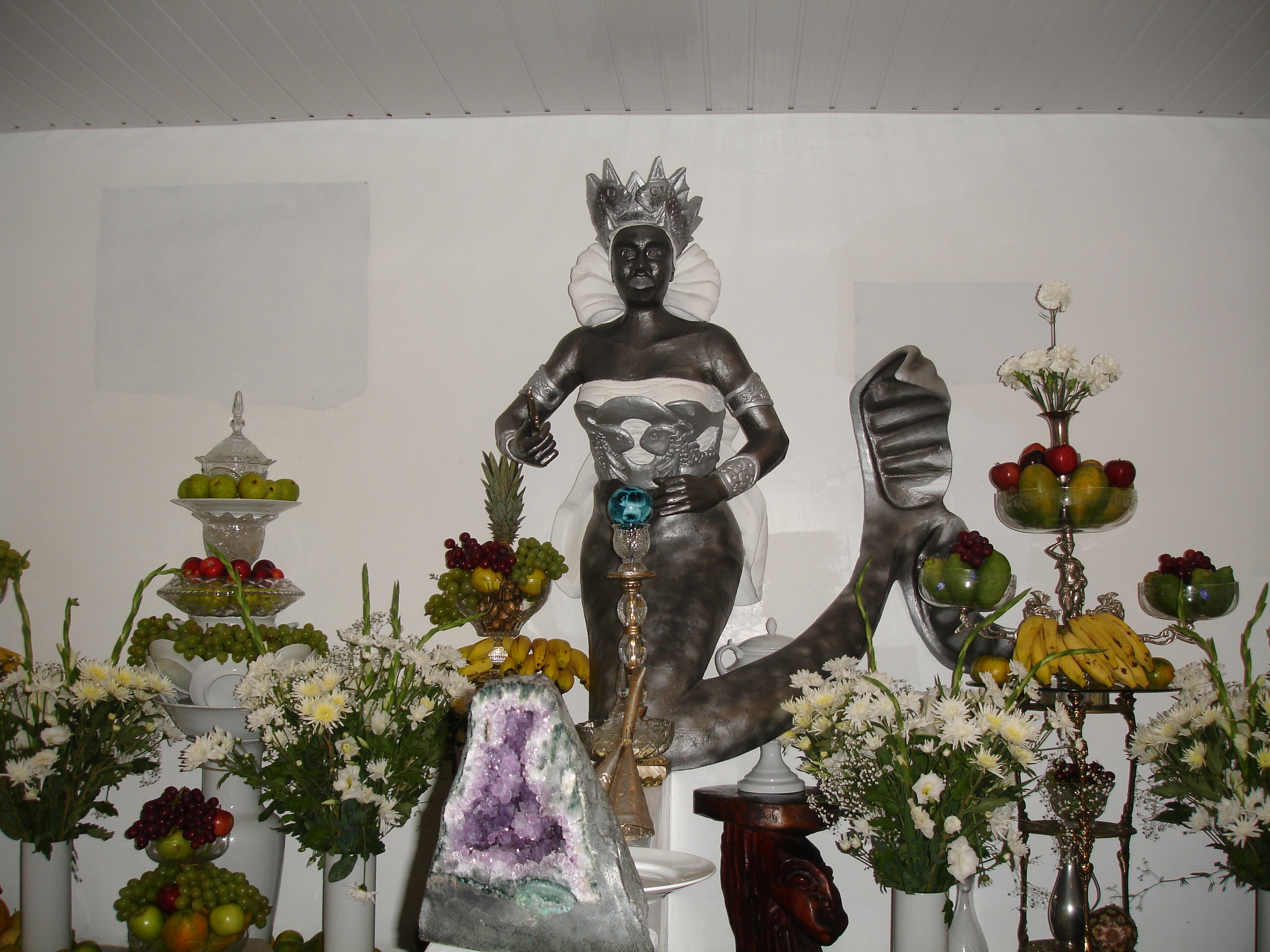 Oferenda para Yemanja